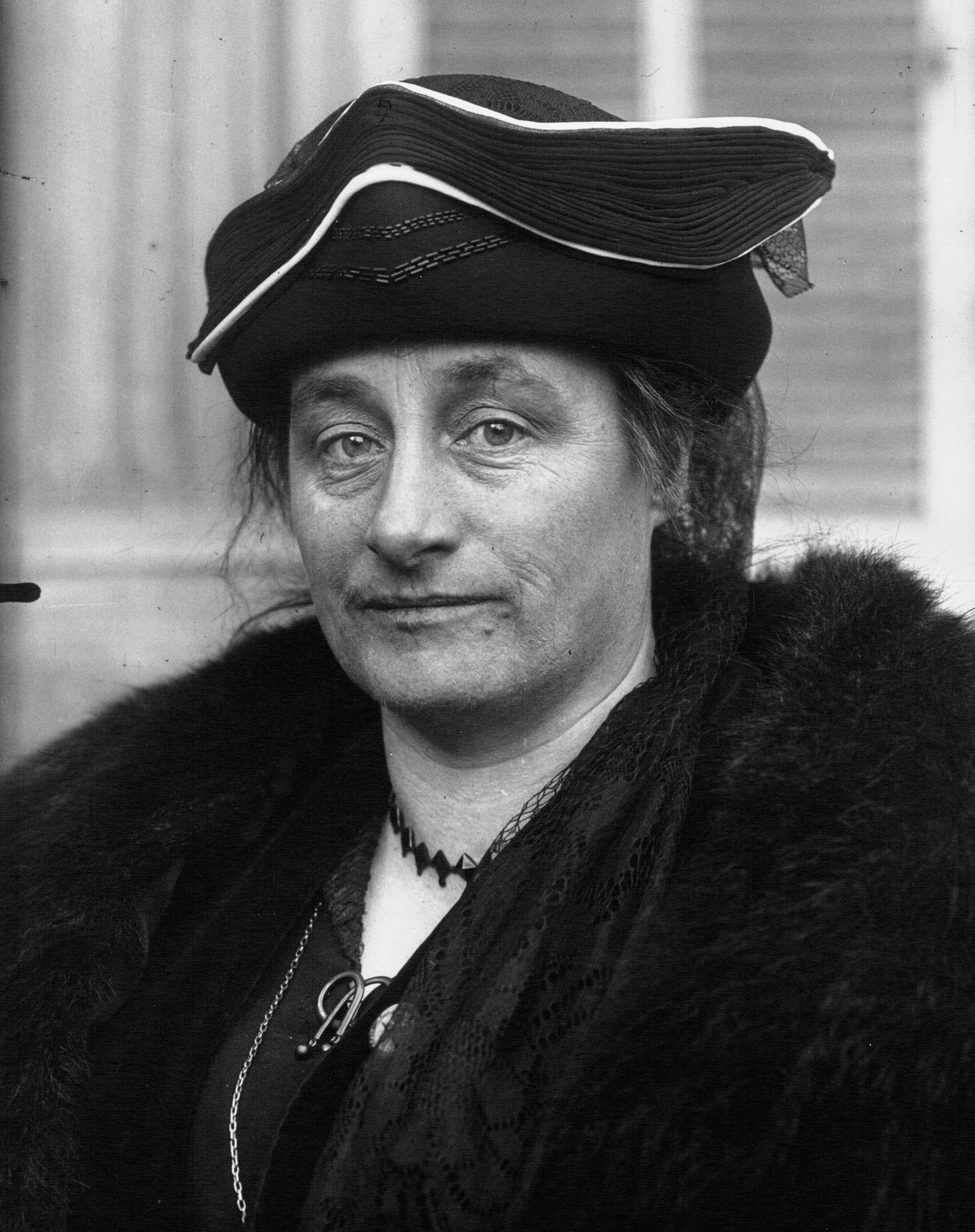 Photographie de Jeanne Mélin en 1921 à Marseille